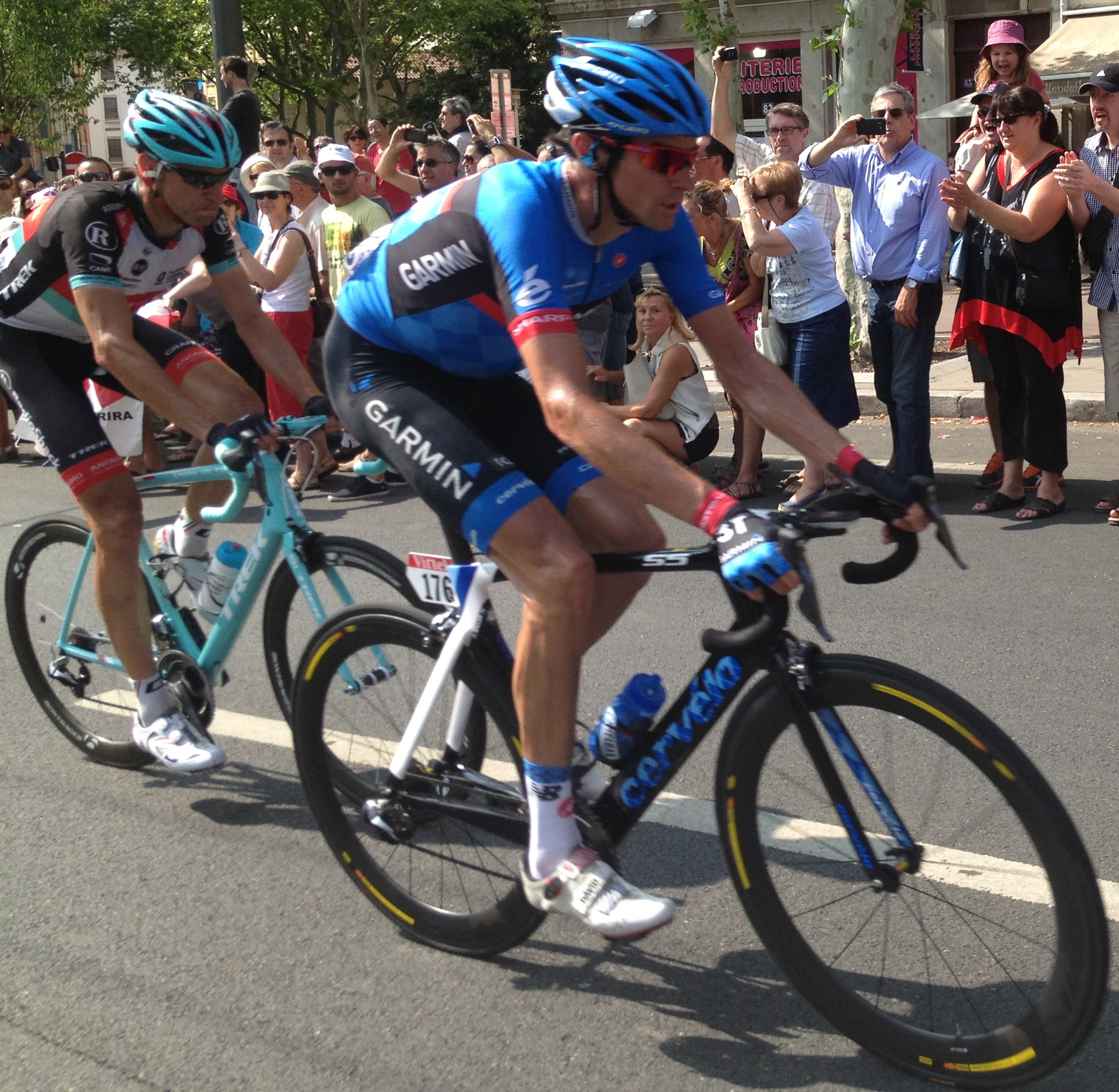 Etape 14 du Tour de France 2013.